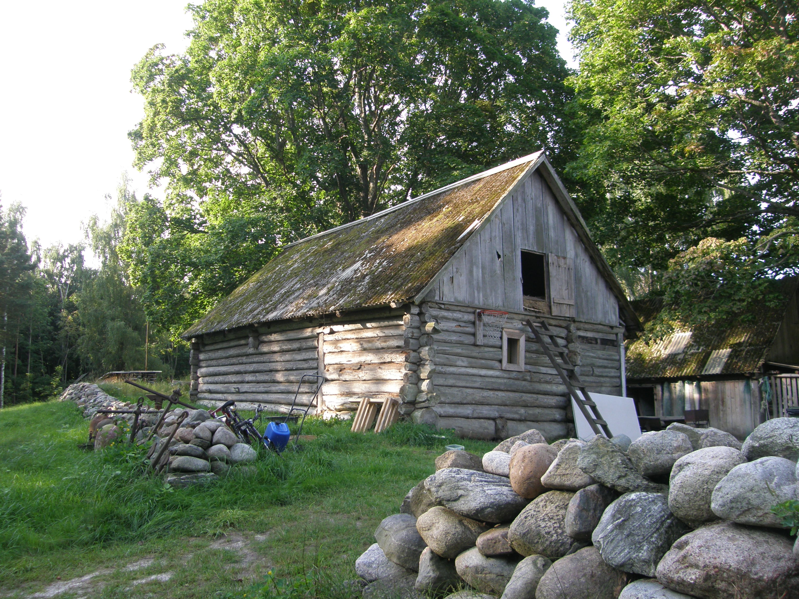 Buldersi talu ait Ruhnus